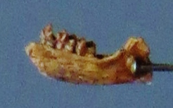 Fossil of Teilhardina, an extinct mammal - Took the picture at Musee d'Histoire Naturelle, Paris